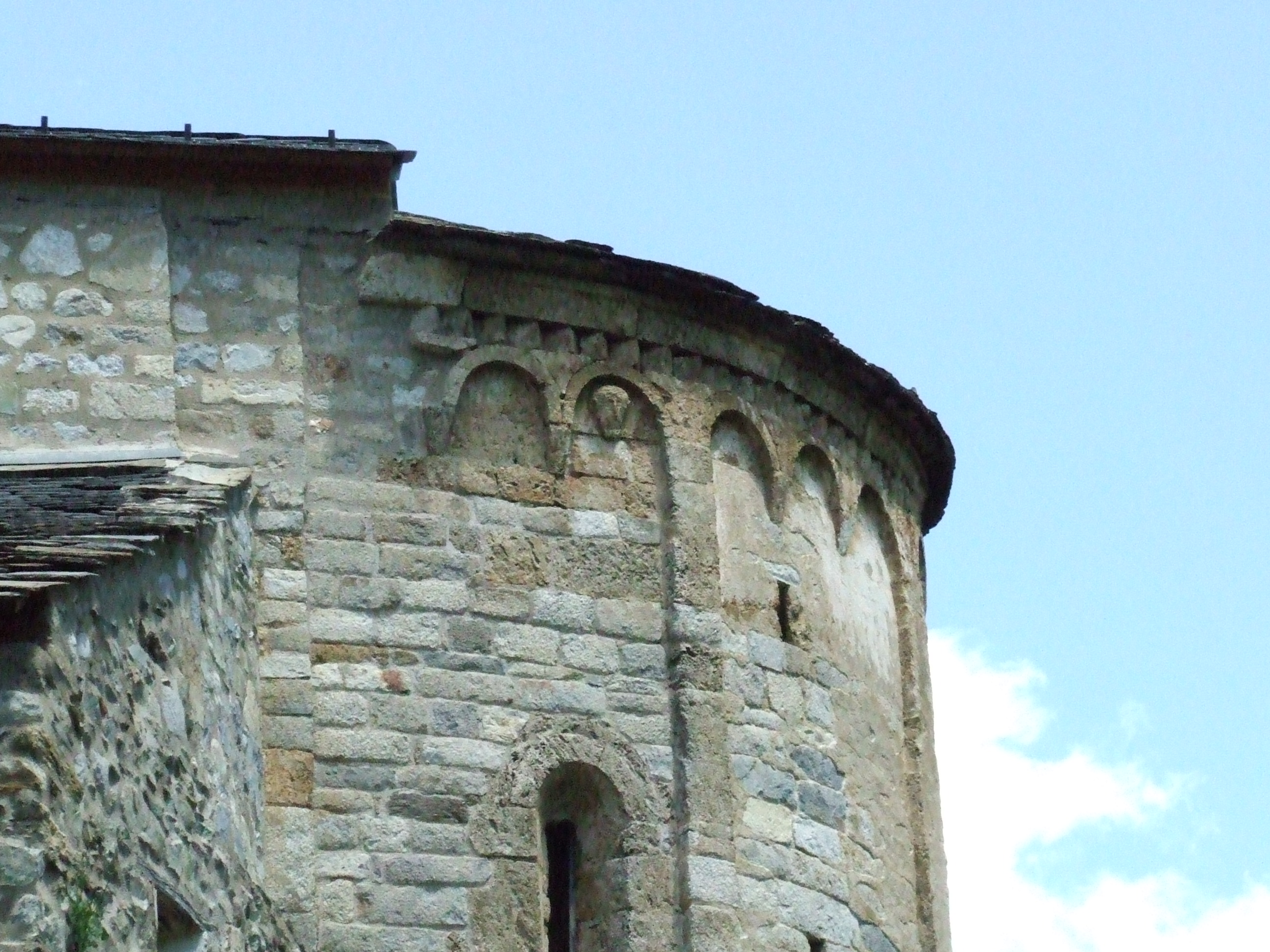 Absis de Santa Maria de Cardet (Barruera, Vall de Boí, Alta Ribagorça)